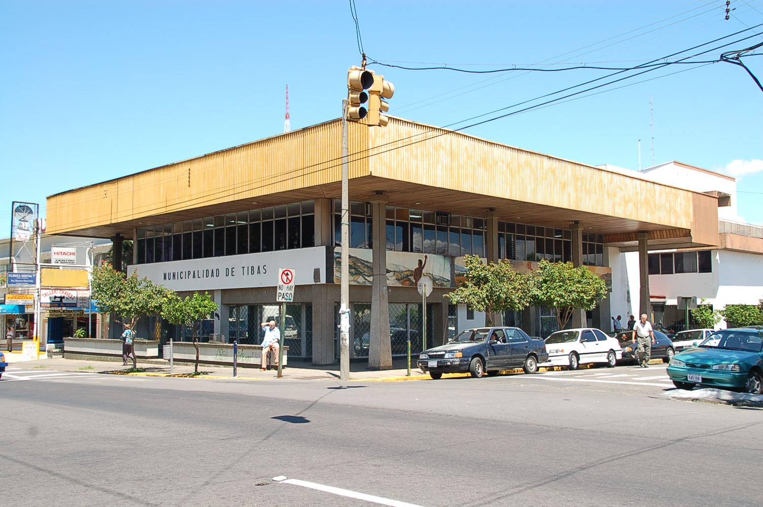 Palacio Municipal del Cantón de Tibás, San José, Costa Rica